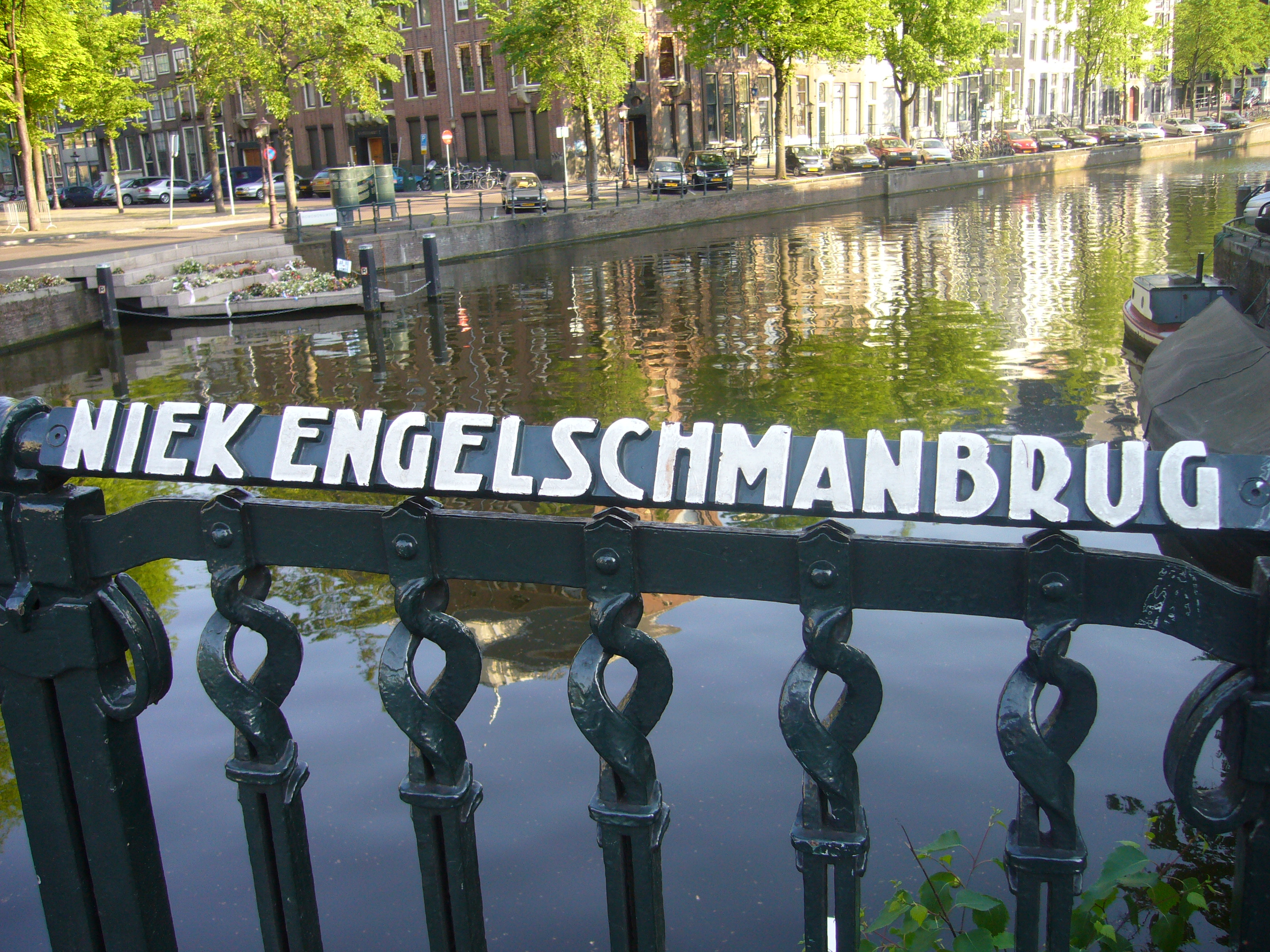 Niek Engelschman, brug in Amsterdam is naar hem vernoemd